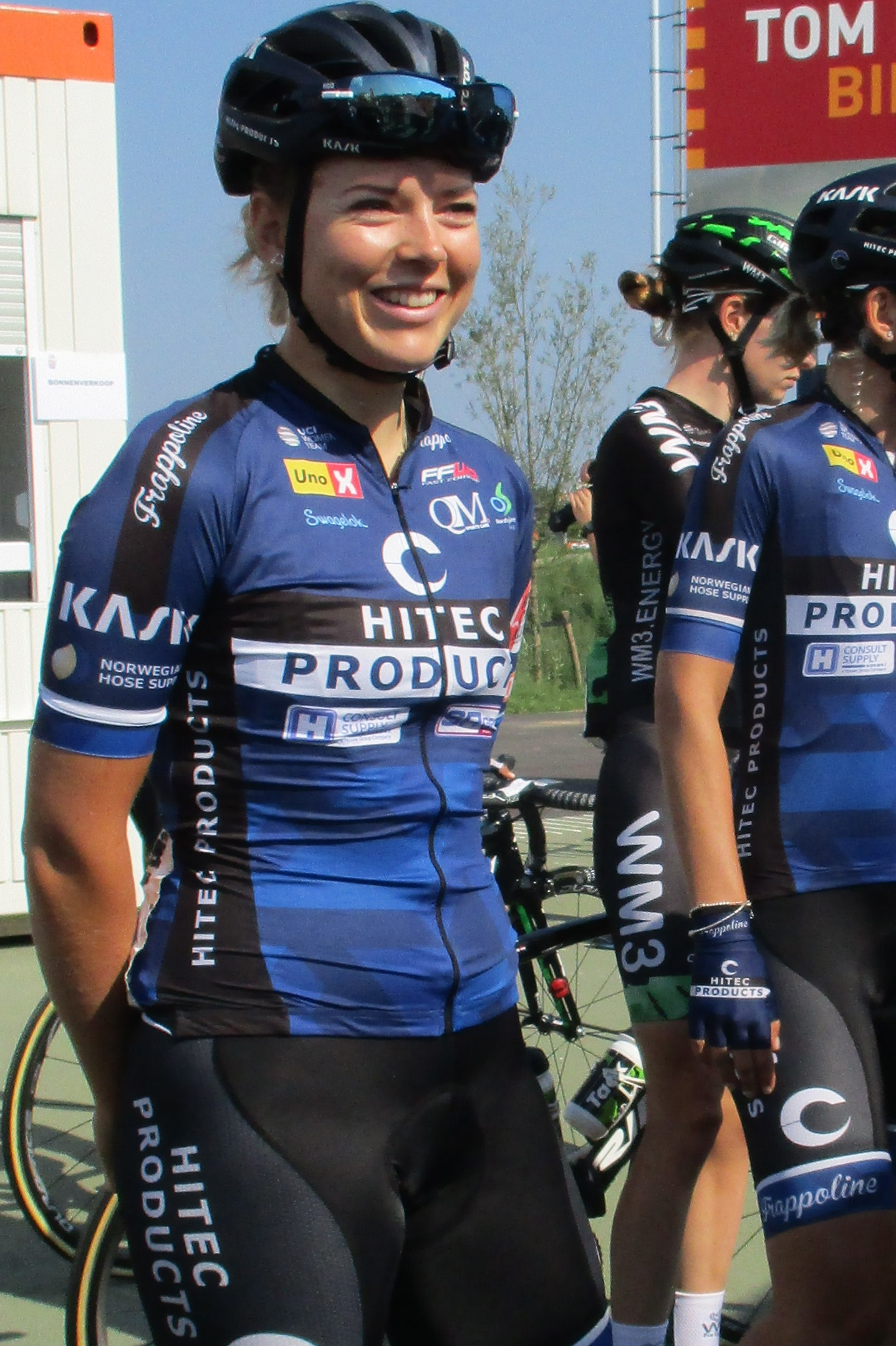 Start van de 6e etappe van de Boels Ladies Tour 2017 op het Tom Dumoulin Bike Park in Sittard-Geleen.